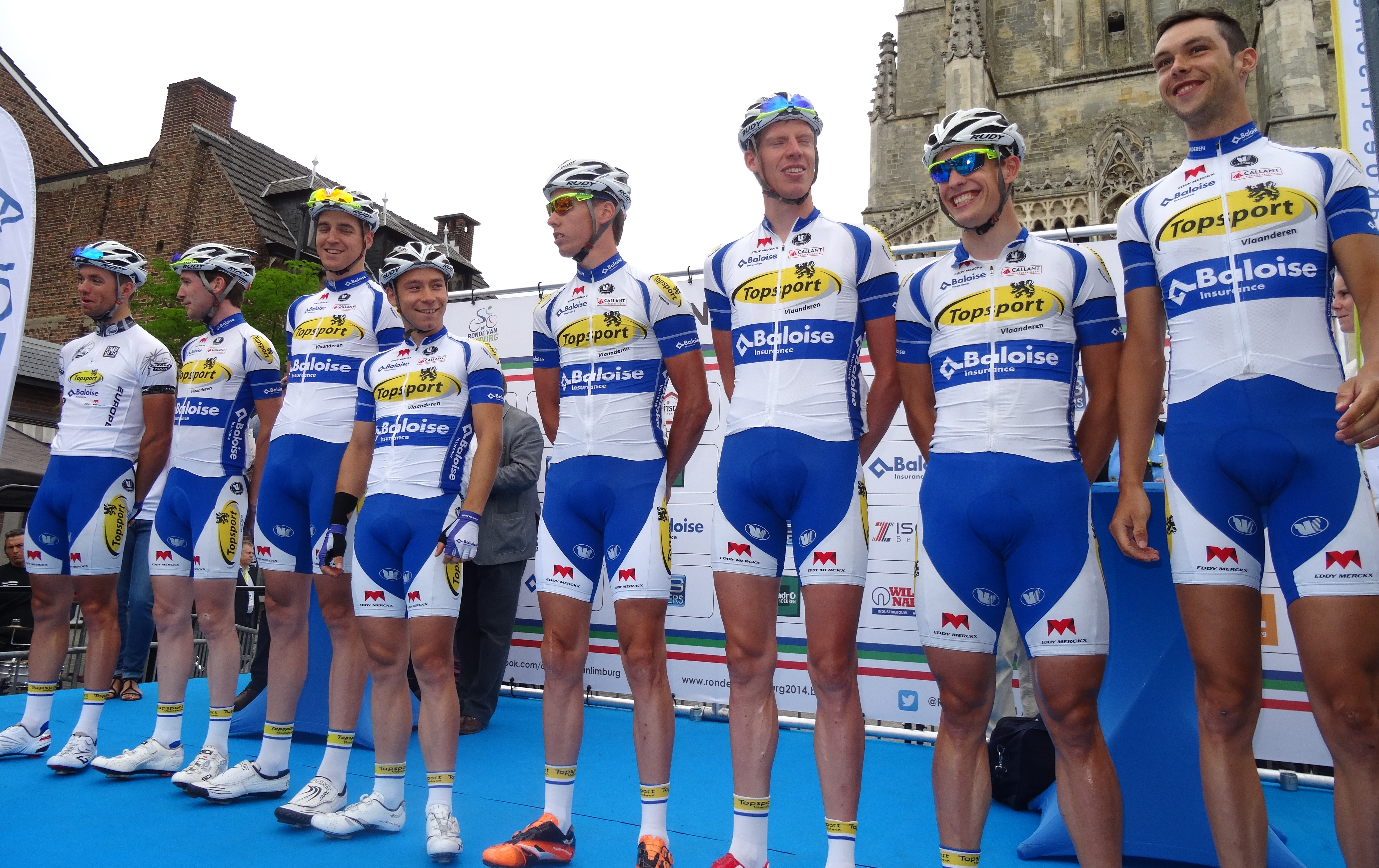 Reportage photographique réalisé le dimanche 15 juin à l'occasion du départ et de l'arrivée du Tour du Limbourg 2014 à Tongres, Belgique.